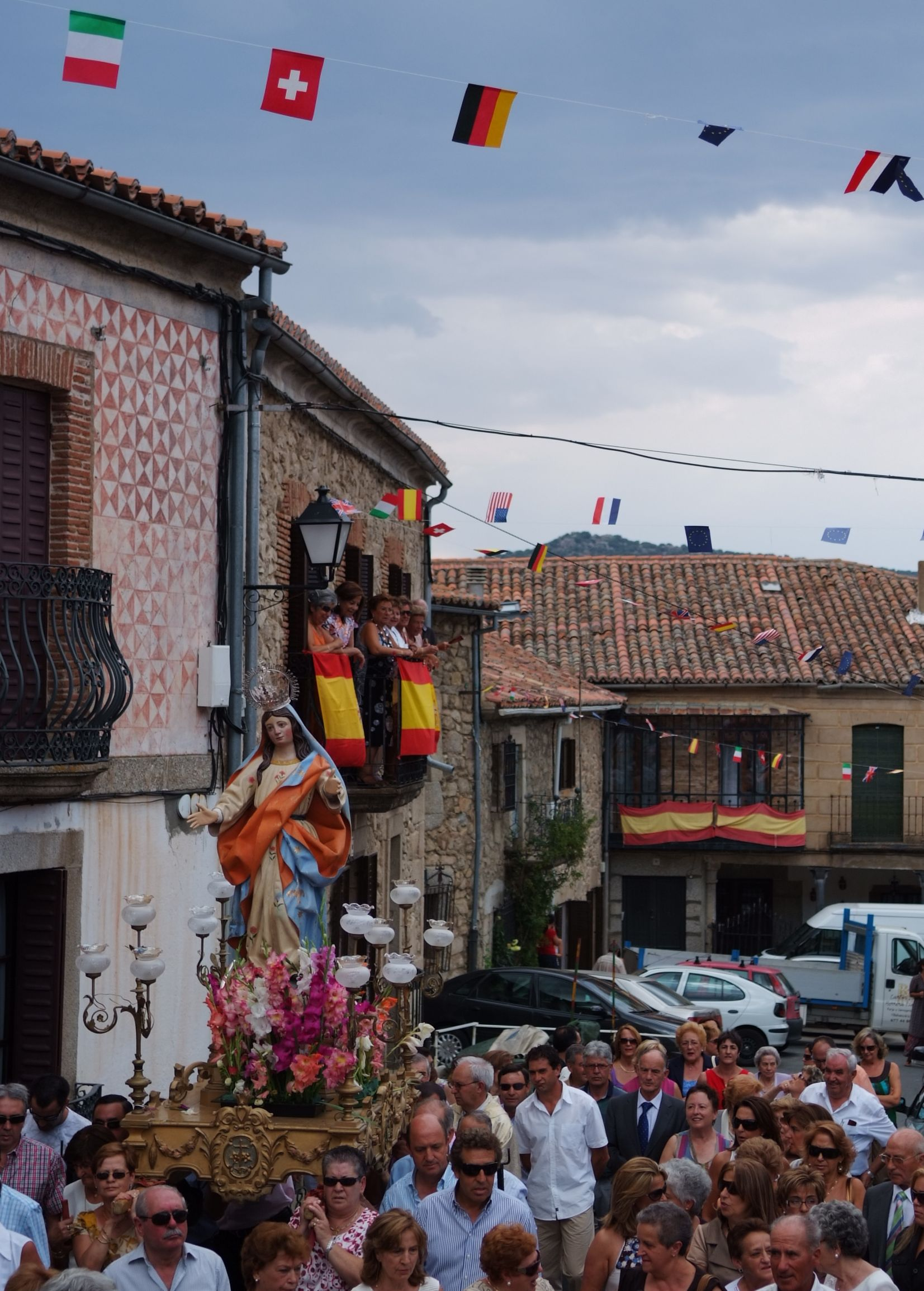 Procesión de la Virgen de la Asunción (15 de agosto)